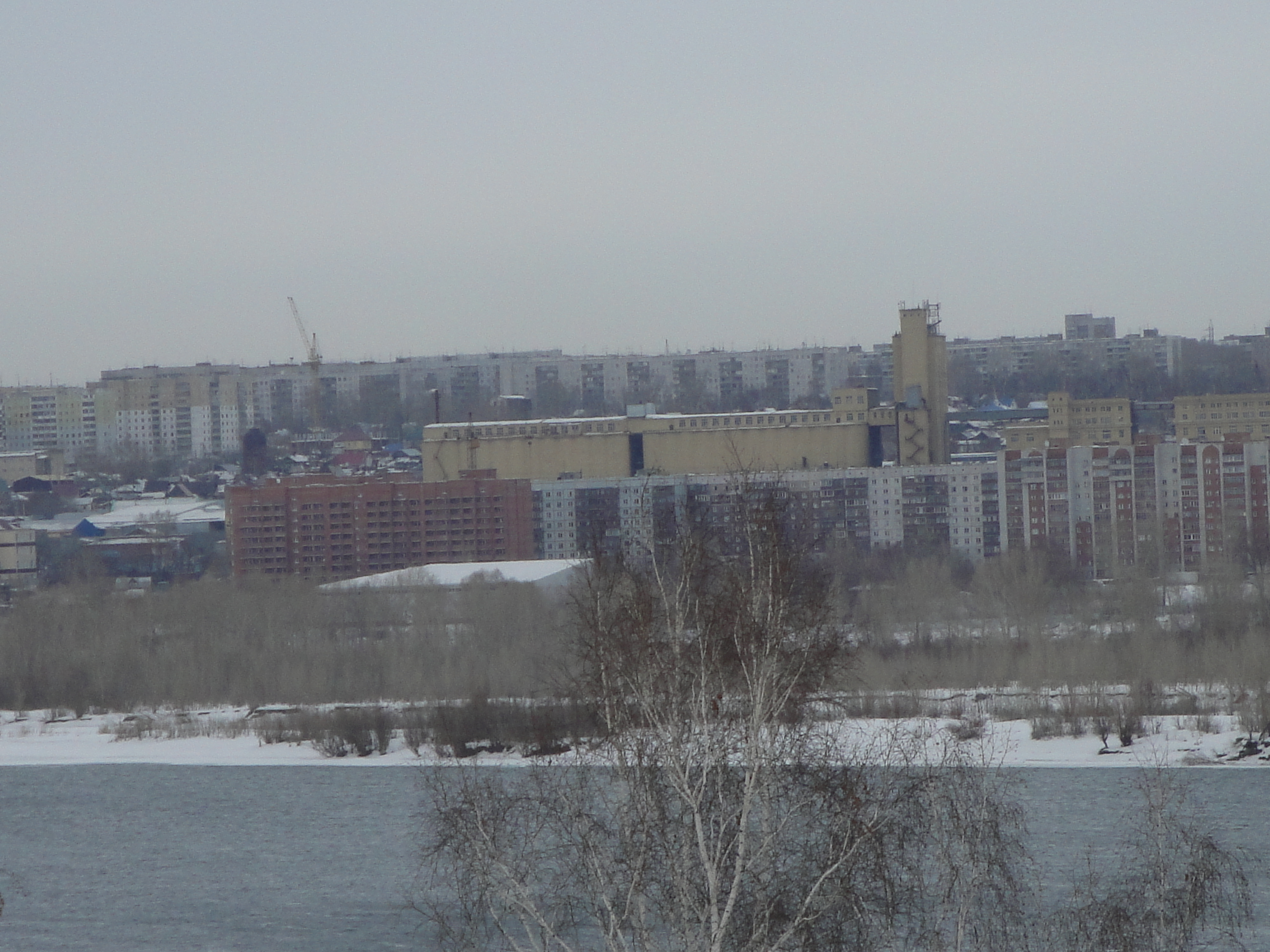 Фото из Бугринской рощи. Виден элеватор на улице Большевистской (Новосибирского Мелькомбината).